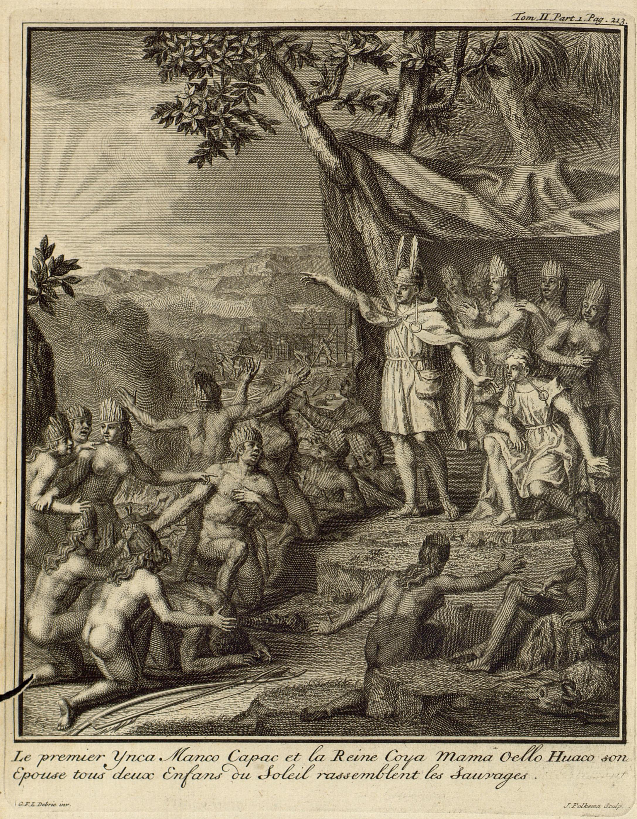 Autor: Juan, Jorge, 1713-1773 Descripción bibliográfica: Voyage historique de l'Amerique Meridionale : fait par ordre du Roi d'Espagne / par Don Georges Juan ... , et par Don Antoine de Ulloa ... ; et qui contient une Histoire des Yncas du Perou et les Observations Astronomiques et Physiques, faites pour déterminer la figure et la Grandeur de la Terre. - tome second. - A Amsterdam ; et a Leipzig : chez Arksteét et Merkus, 1752. - [2], 316, [14], 309, [3] p., h. XXVI-XLVI grab. pleg., [8] h. de grab. ; 4º Materia: América - Descripciones y viajes - Obras anteriores a 1800 Materia: Incas - Historia - Obras anteriores a 1800 Notas: Autoridades de Jan Punt (FRBNF40346915) y Bernard Picart (FRBNF11919656) tomadas de OPALE . - Contiene: Histoire des Yncas du Perou.Observations astronomiques et physiques. - Palau, 125.473. - Sign.: 1, A-2R4, 2S1, [ast.]4, A-2Q4. - Port. a dos tintas, con escudo real de los Borbones cal.: "J. Punt. sculp." - 1 H. de grab. antes de la port..: "Picart inv. et Lelin 1733, Du Flos sculp." . - Grab. calc. en port.: "J. Punt. sculp." y en A1: "J. Schenk Sculp." . - Las h. de planchas calc. son planos de diversas islas y objetos relacionados con la observación astronómica . - 1 H. de grab. y grab. pleg. son cal. Autor: Ulloa, Antonio de, 1716-1795 Grabador: Punt, Jan, 1711-1779 Grabador: Ingram, J. Ilustrador: Gochin, C. N. Grabador: Bakker, Frans de, 1736-1765 Editor: Arkstée, Johann Caspar|eed Impresor:Merkus, Henricus Lugar de impresión: Holanda, Amsterdam Lugar de impresión: Alemania, Leipzig Localización: Libro completo